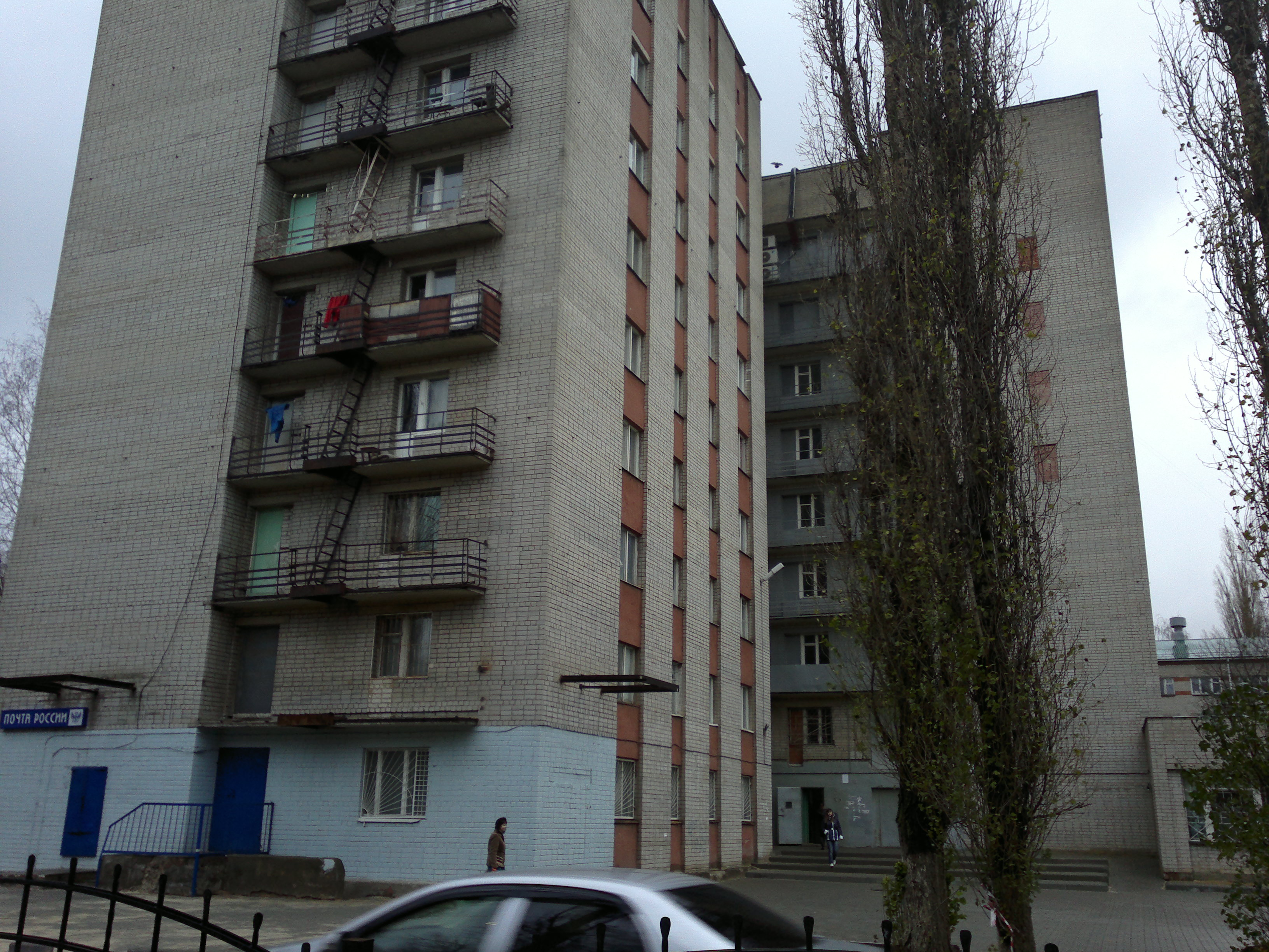 Общежитие №7 ВГАУ 31 октября 2012 года